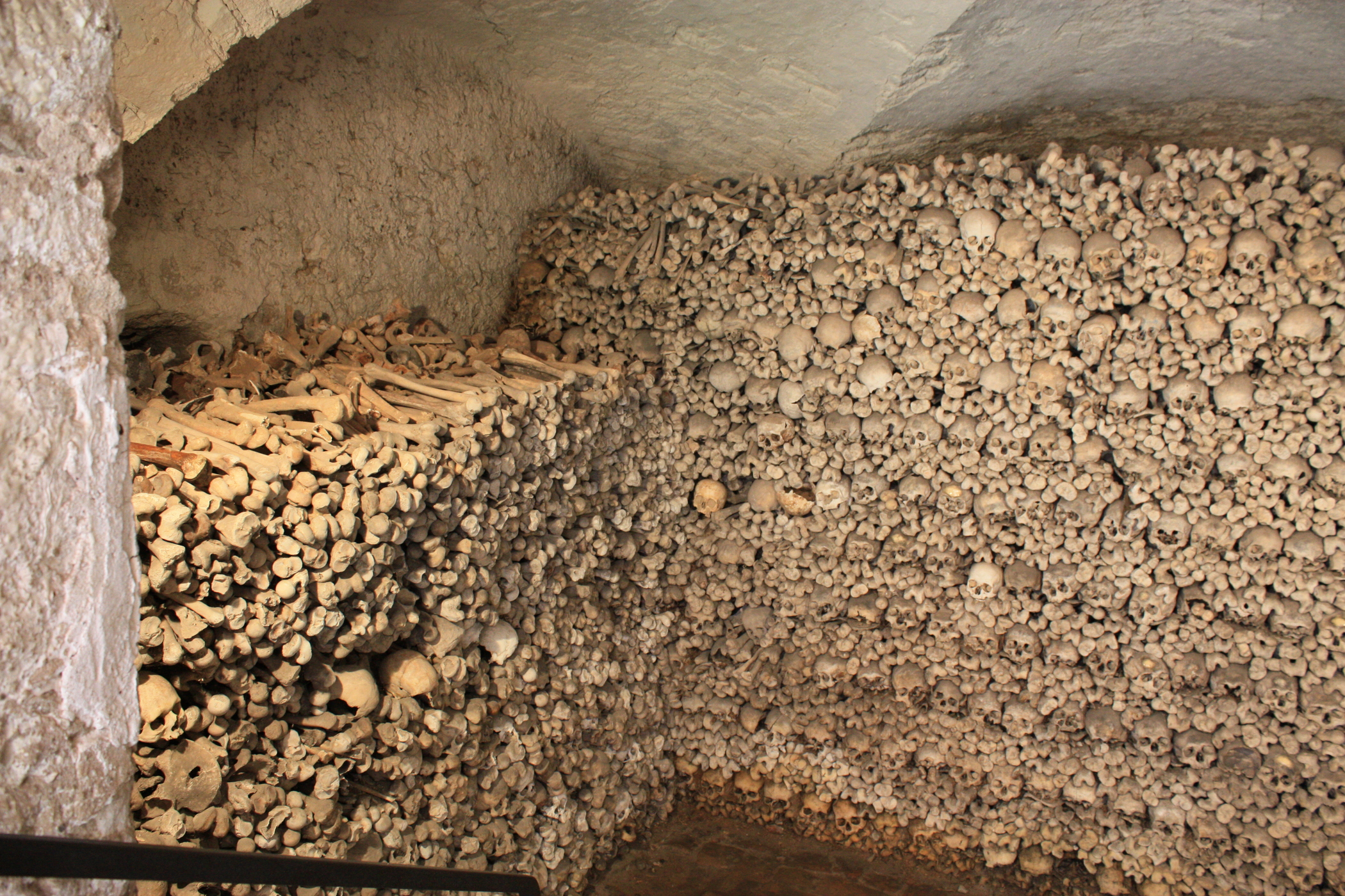 Michaelskapelle Oppenheim (Beinhaus), Gebeine